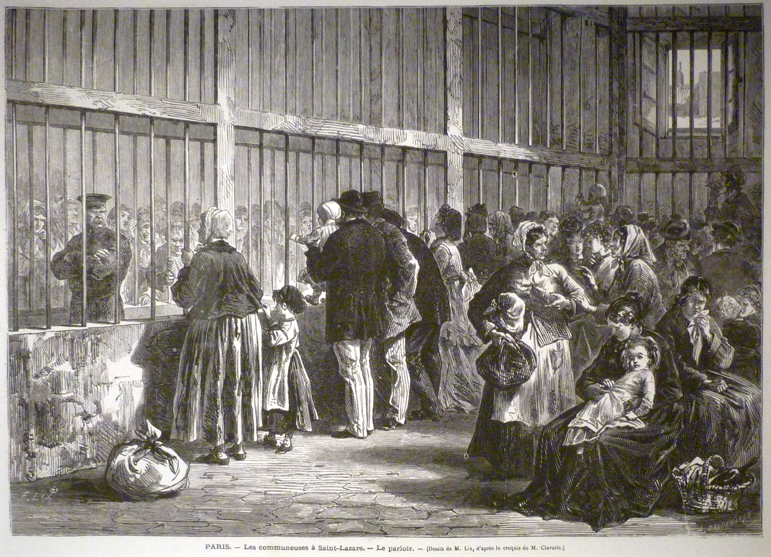 Exposition La Commune de Paris à l'Hôtel de Ville de Paris (18 mars - 28 mai 2011) - Visite aux communards dans la prison pour femmes de St. Lazare.